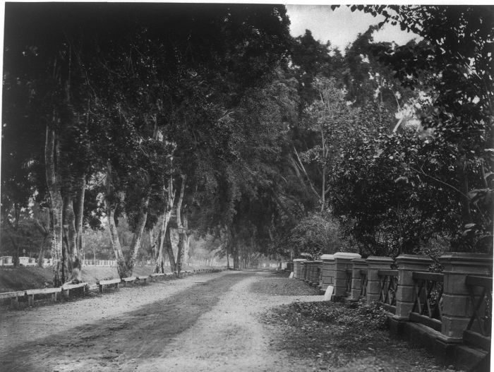 Foto. De Tanah Abang in Batavia, West-Java.